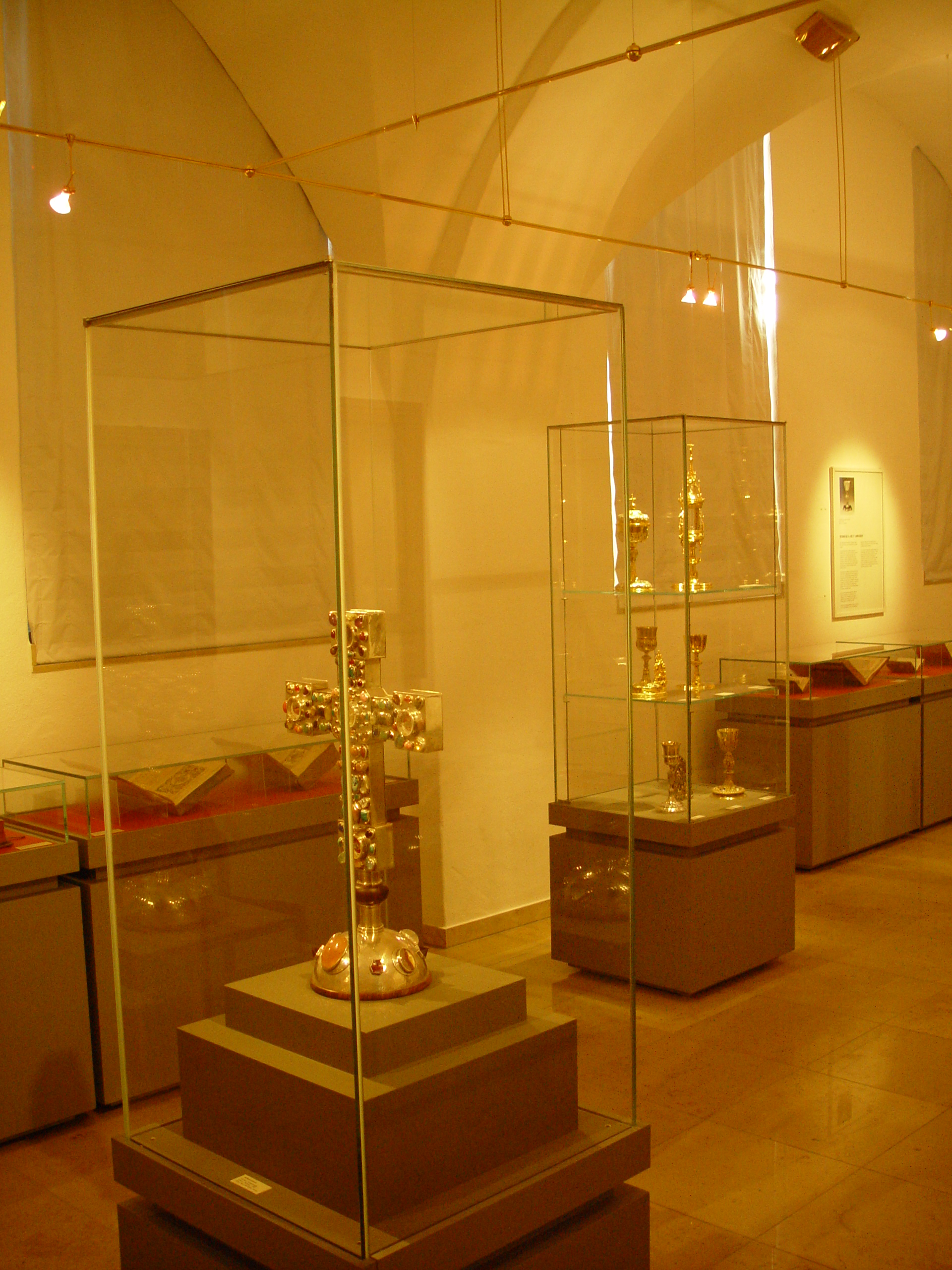 Museum Kloster Grafschaft